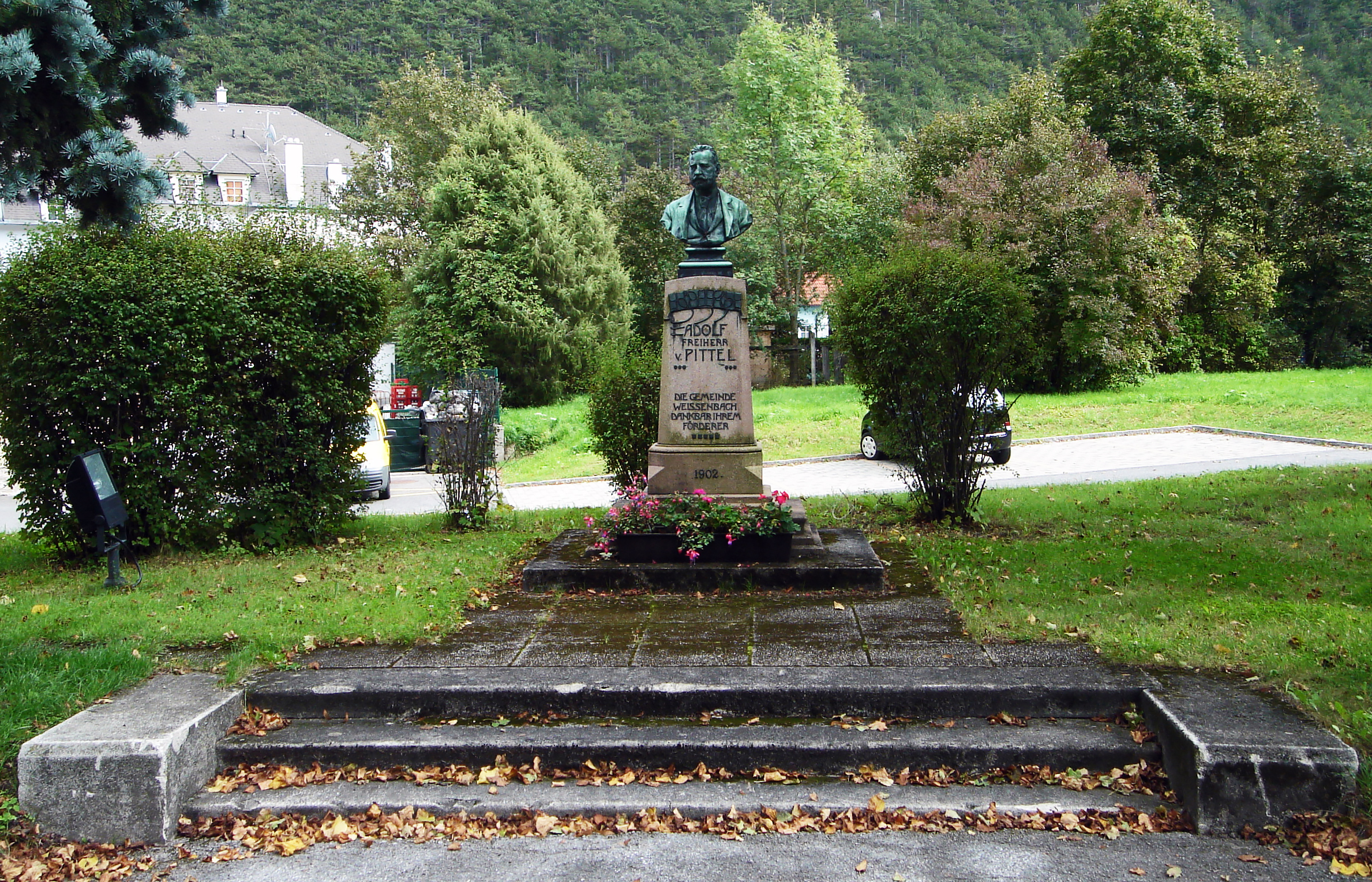 Weissenbach an der Triesting, Niederösterreich, Denkmalanlage für Adolph Freiherrn von Pittel